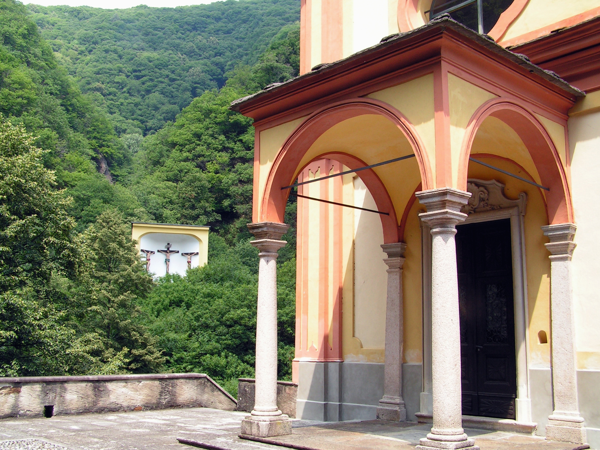 Via Sacro Monte 19, Brissago. Église sanctuaire de Santa Maria Addolorata del Sacro Monte.